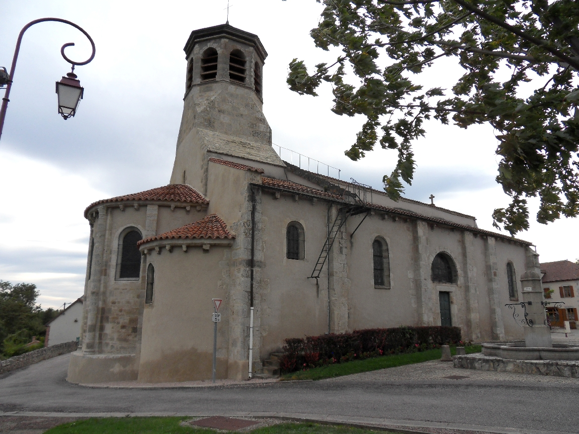 Église Saint-Marcel (Inscrit) .